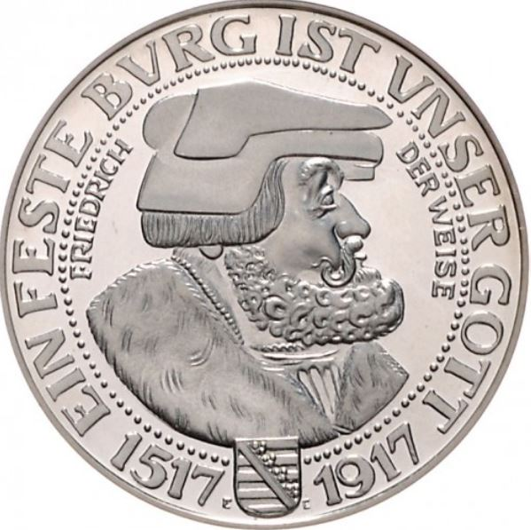 Sachsen,Friedrich der Weise, Nachprägung 2001